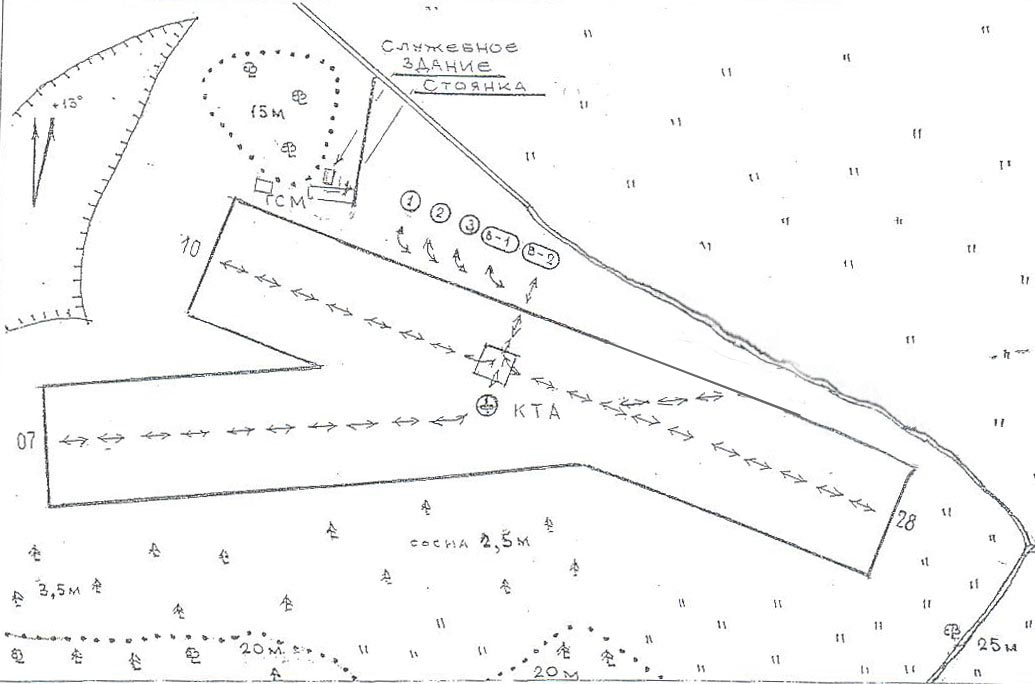 Схема Кучаны